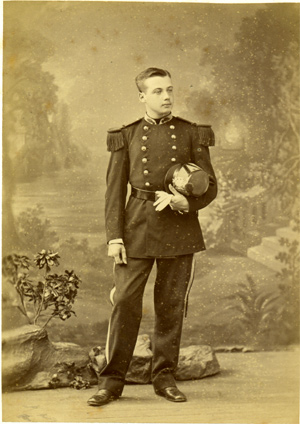 général français (1855-1927) Artist Photo le Jeune (Paris)Title